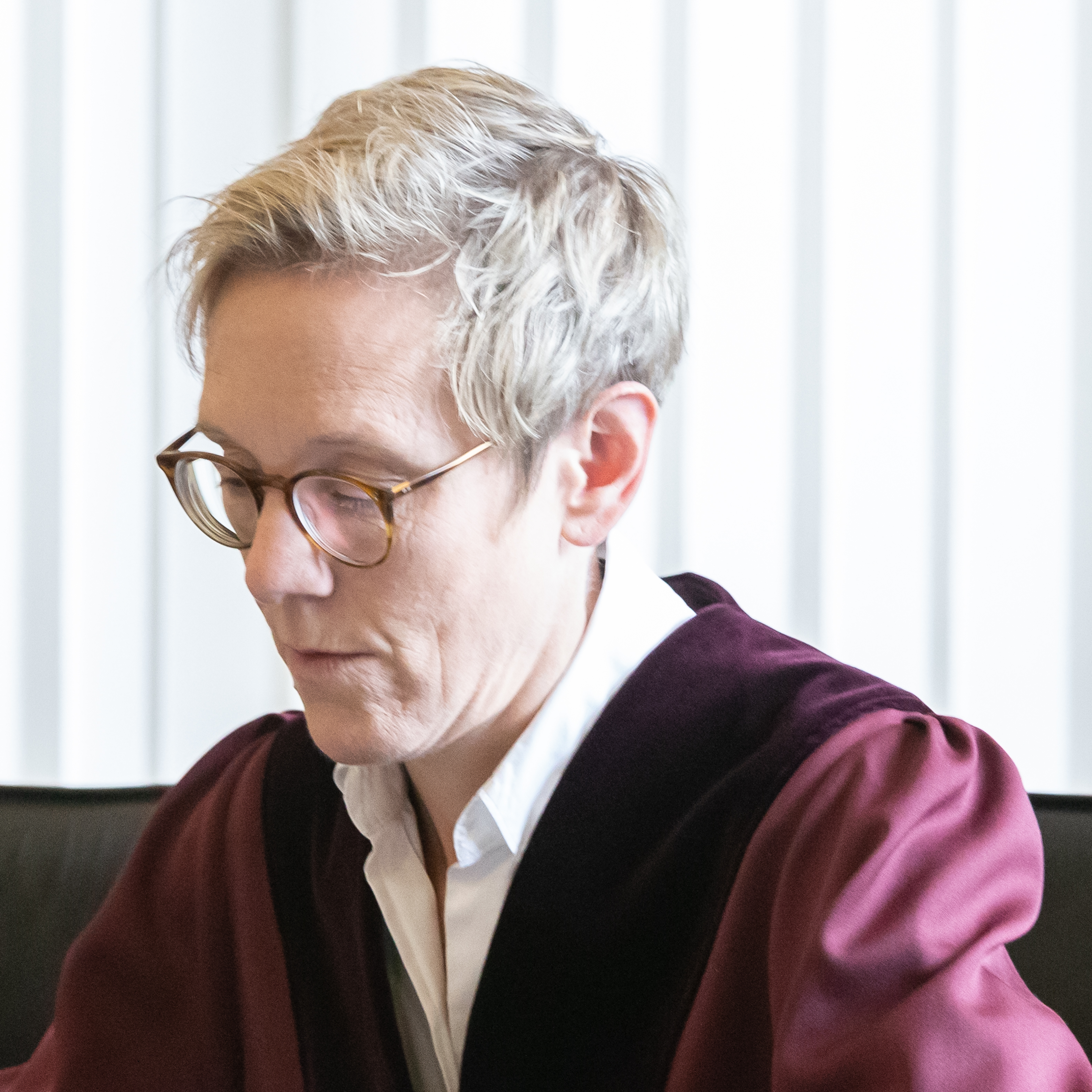 BGH Verhandlungstermin am 31. Oktober 2018 in Sachen I ZR 104/17 (Bundesgerichtshof zur Veröffentlichung von Abbildungen gemeinfreier Kunstwerke): Dr. Christiane Schmaltz, Richterin am Bundesgerichtshof; Porträt, Einzelbild